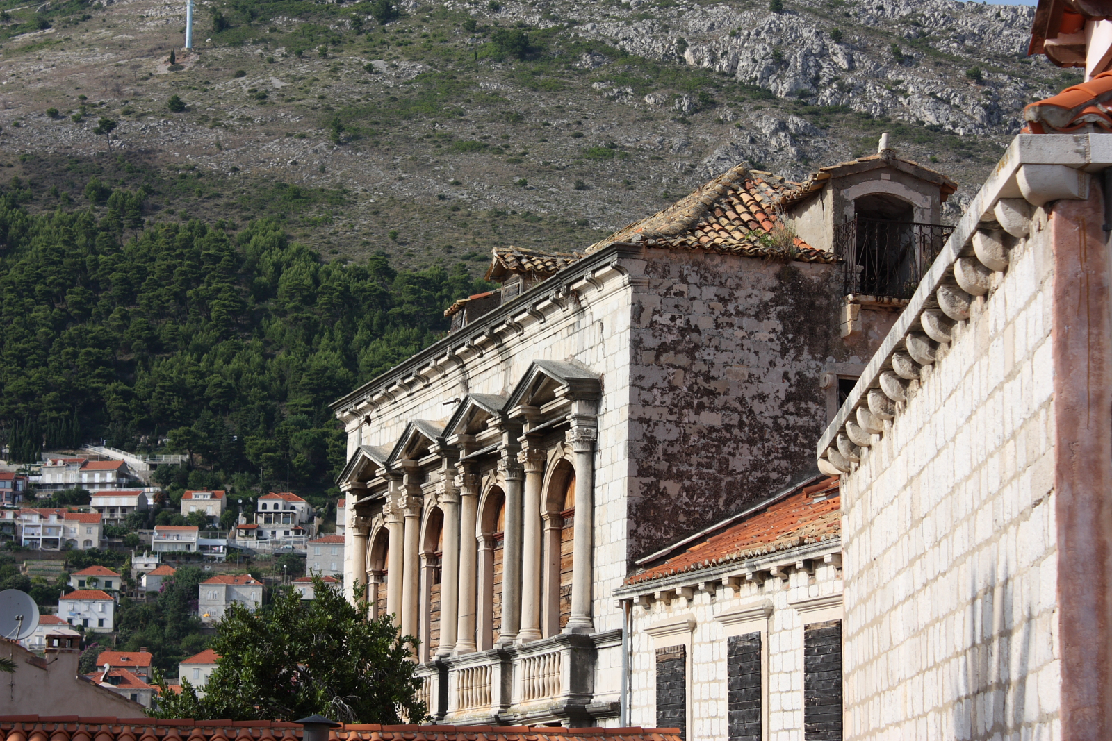 Dubrovnik